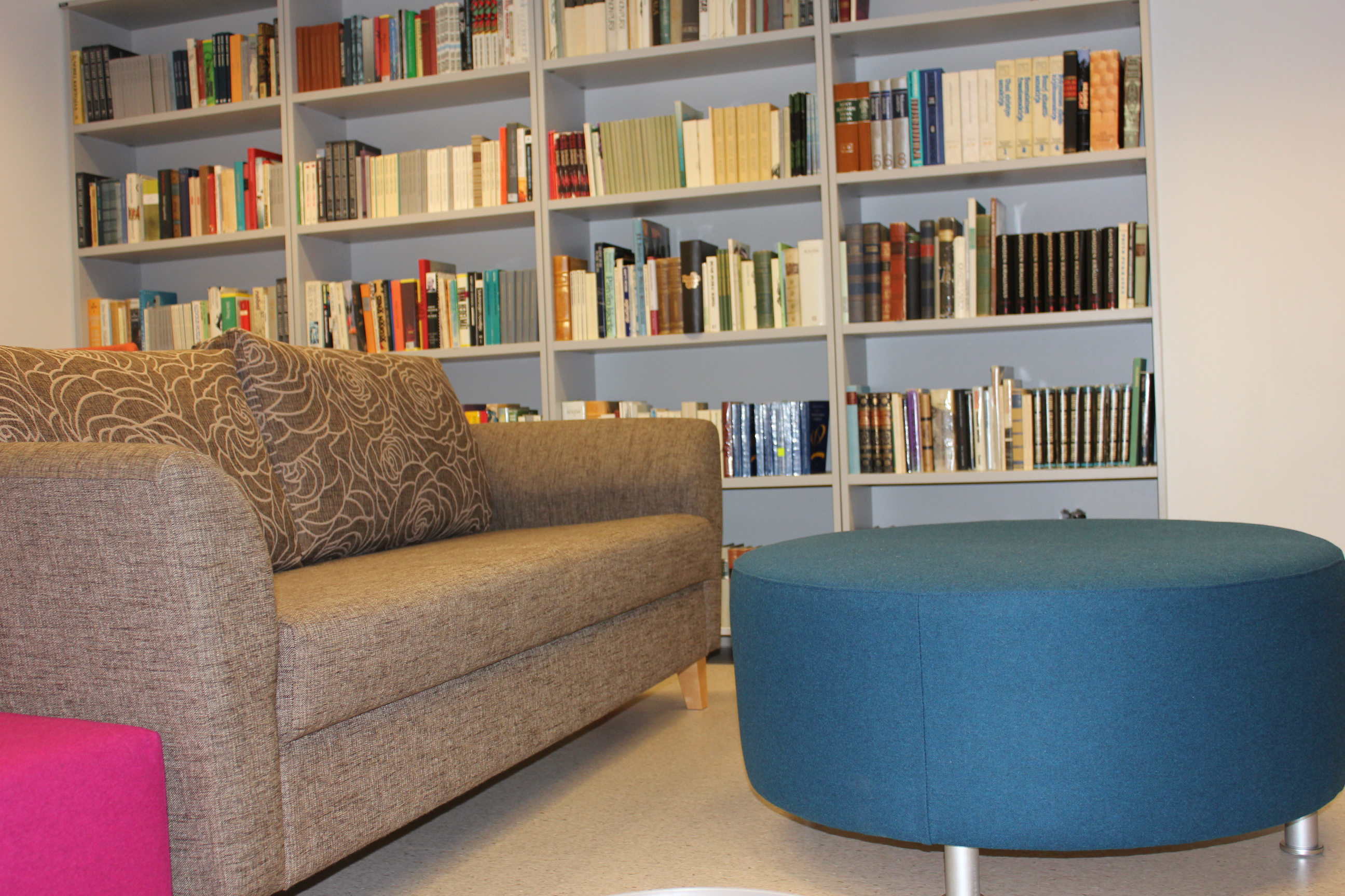 Rautalammin lukion kirjstasto